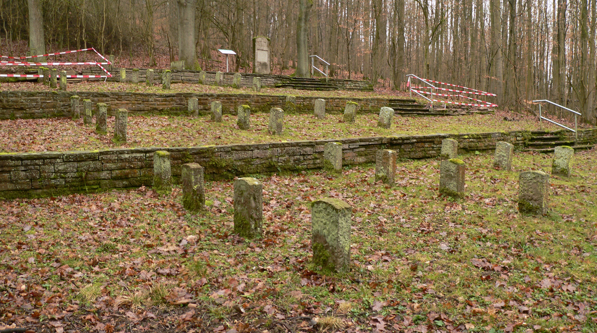 Ehrenfriedhof bei Holzen für KZ-Opfer